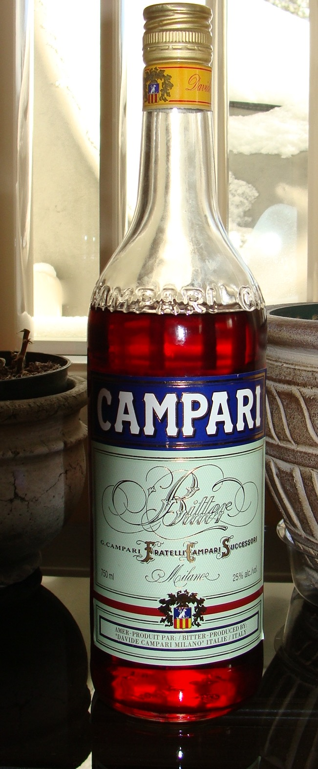 Bouteille de Campari, une boisson alcoolisée.